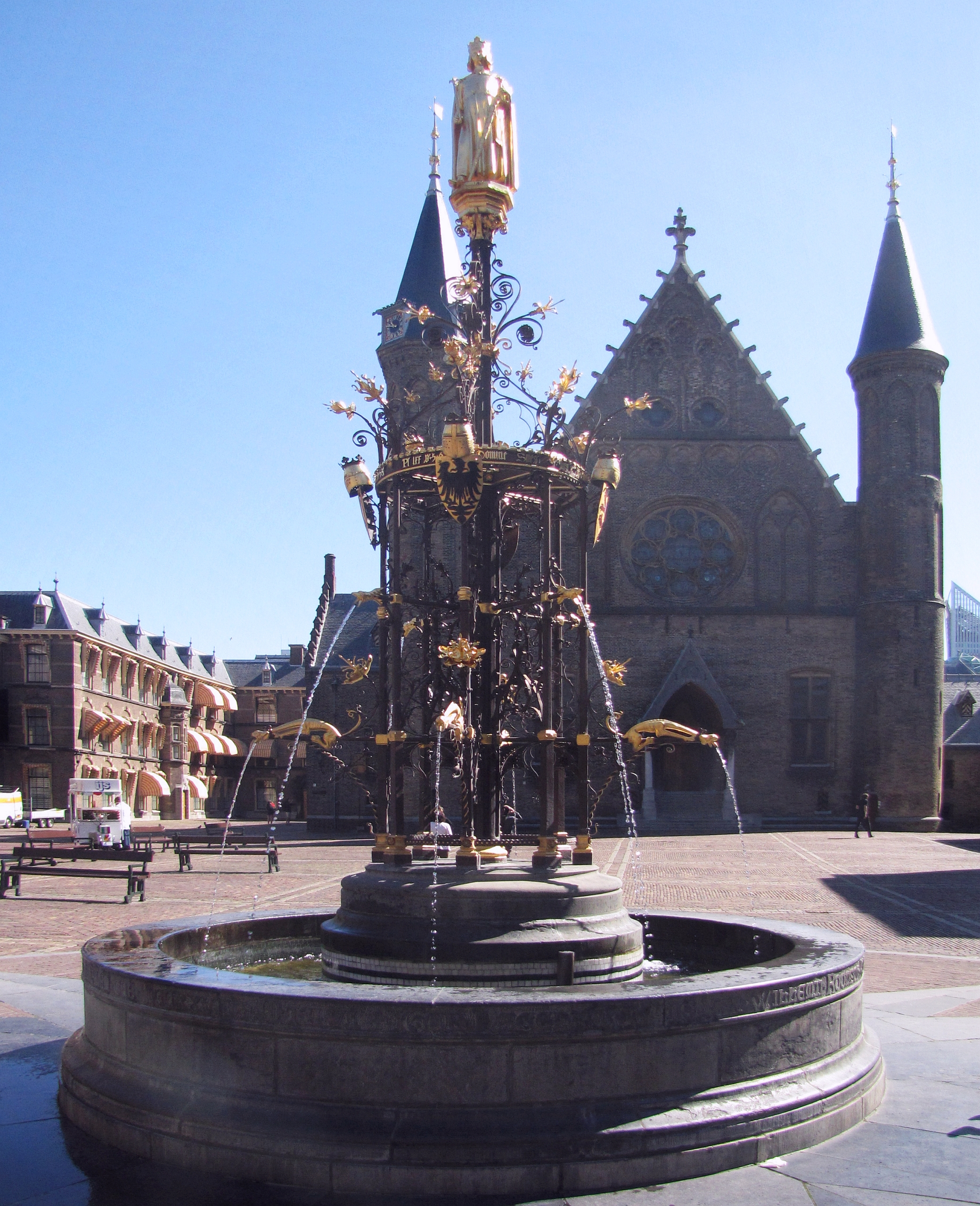 Binnenhoffontein- der Binnenhof-Brunnen von 1885 mit oberer Skulptur Graaf Willem II van Holland gestiftet an die Gemeinde s'´Gravenhage als Dank der Bürger für Wiederherstellung der Binnenhof-Substanz. Den Haag Niederlande - Foto Wolfgang Pehlemann IMG_1218